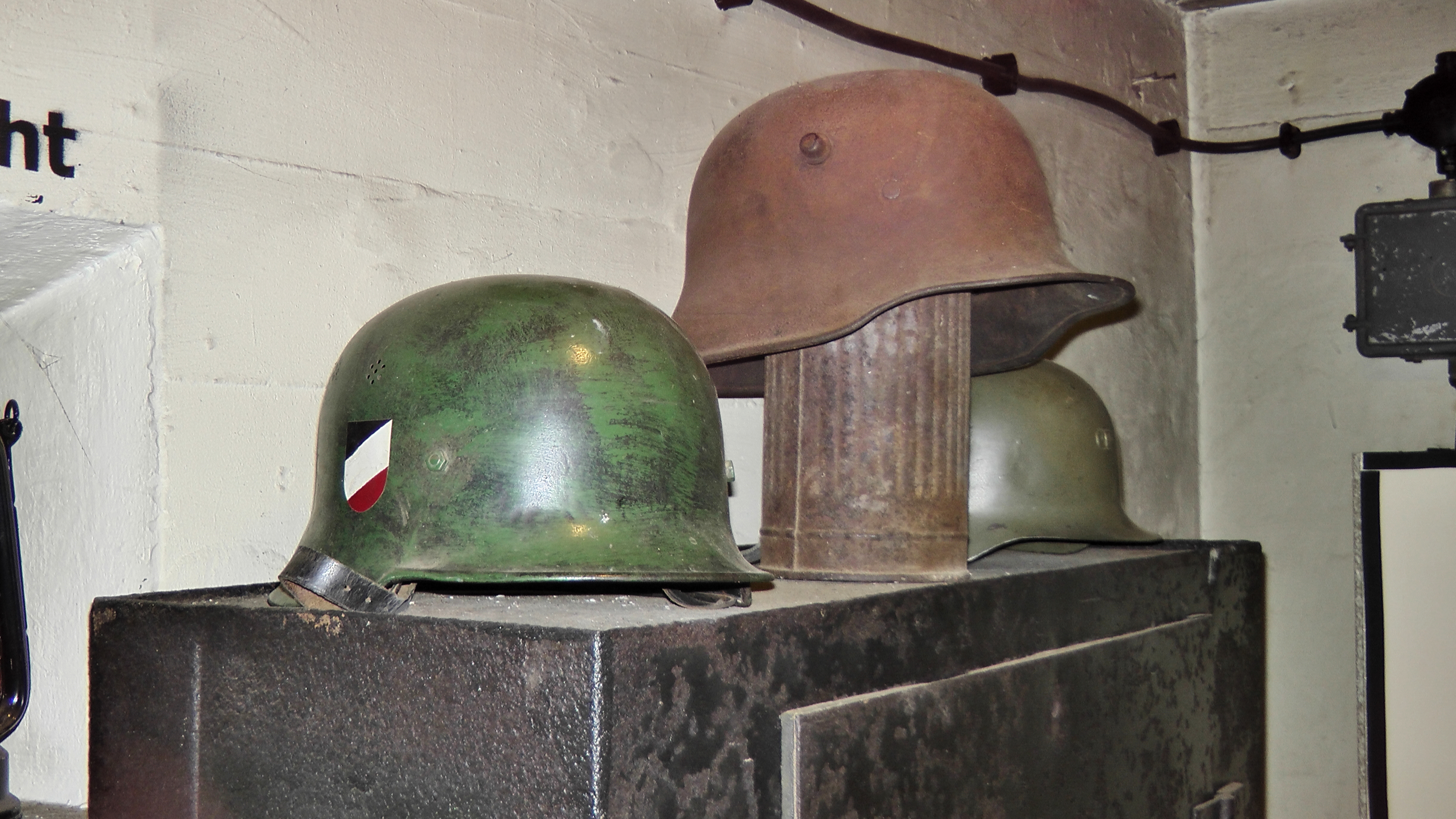 Westwallmuseum Konz, Stahlhelme